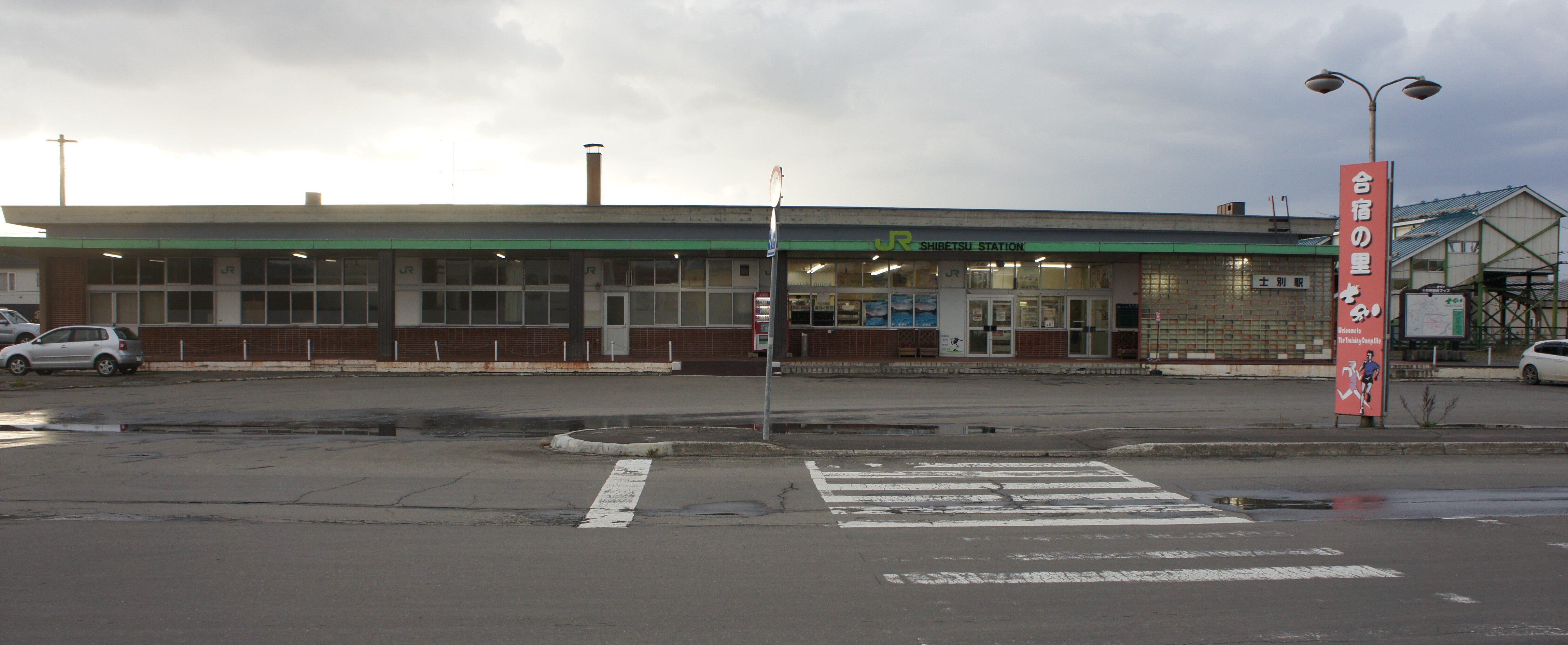 JR宗谷本線・士別駅の駅舎